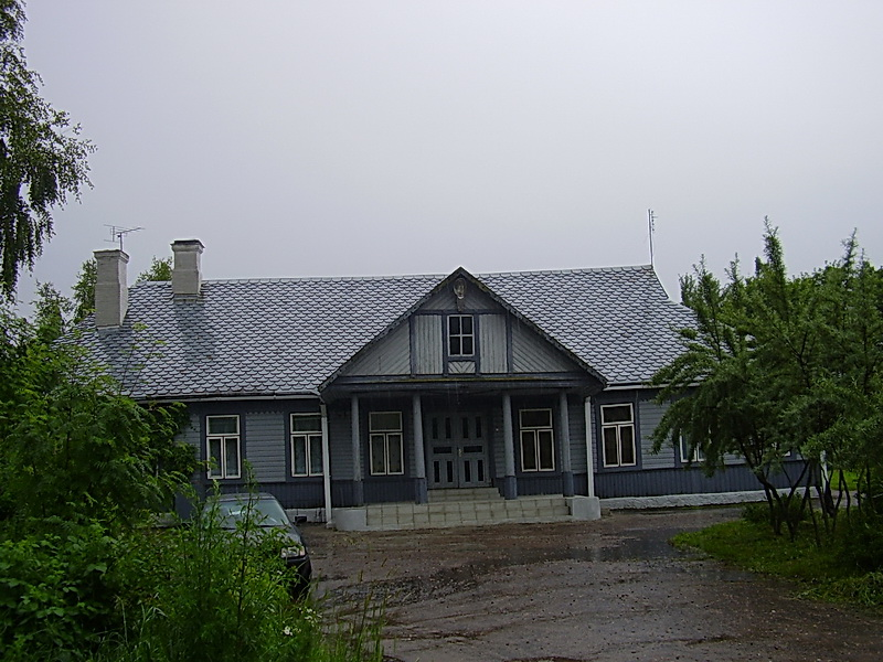 Агарэвічы. Сядзіба Свяржынскіх